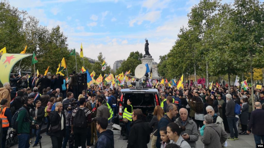 Fransa'daki Barış Pınarı Harekâtı protestosu, Republique Meydanı